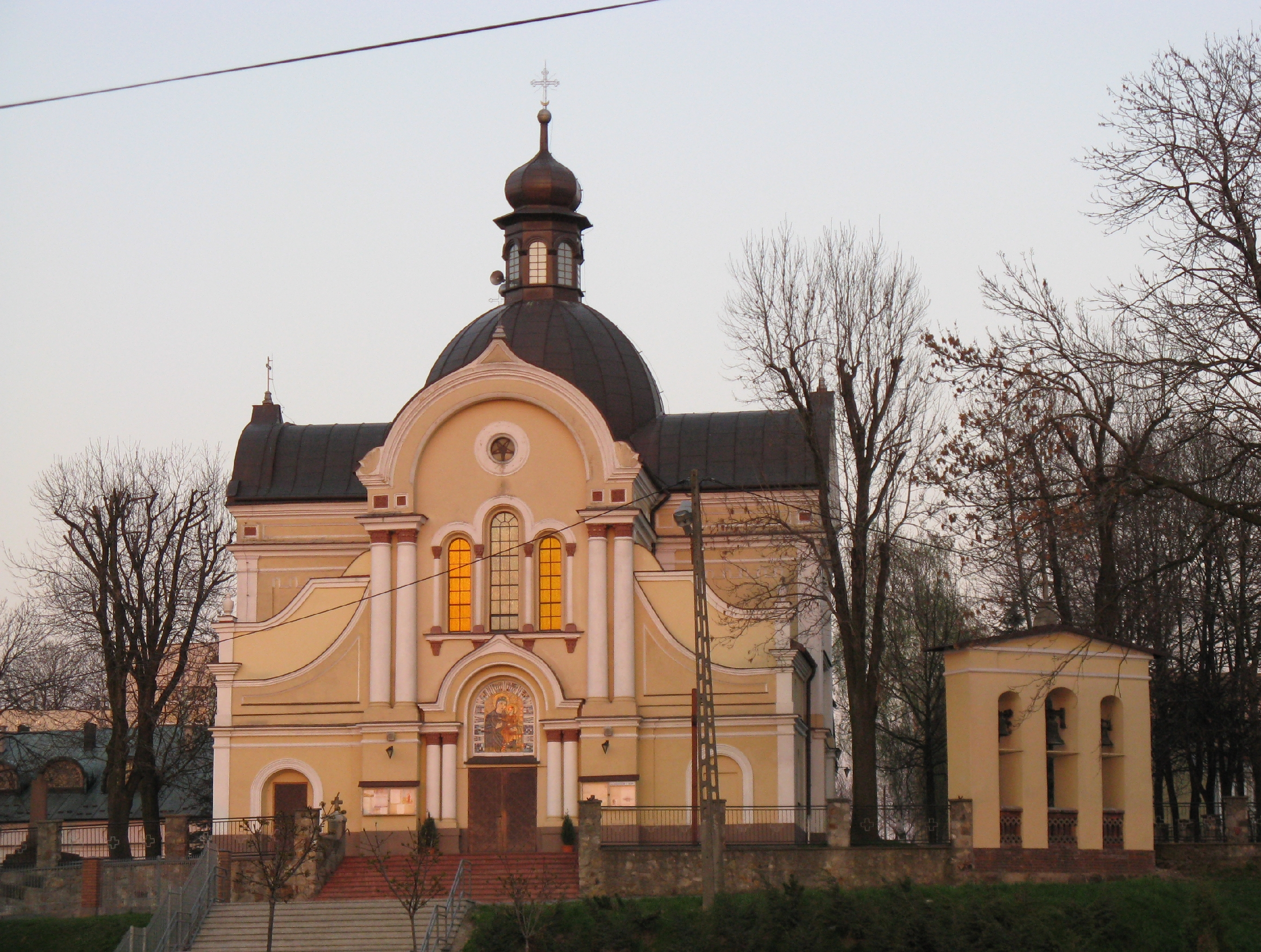 Rzeszów, ul. Zelwerowicza 2 - pierwotnie cerkiew greckokatolicka, obecnie rzymskokatolicki kościół parafialny pw. Wniebowzięcia NMP, 1889